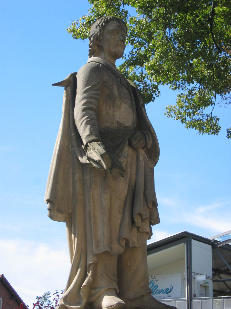 Grabmal von Johann Kaspar Zeuß